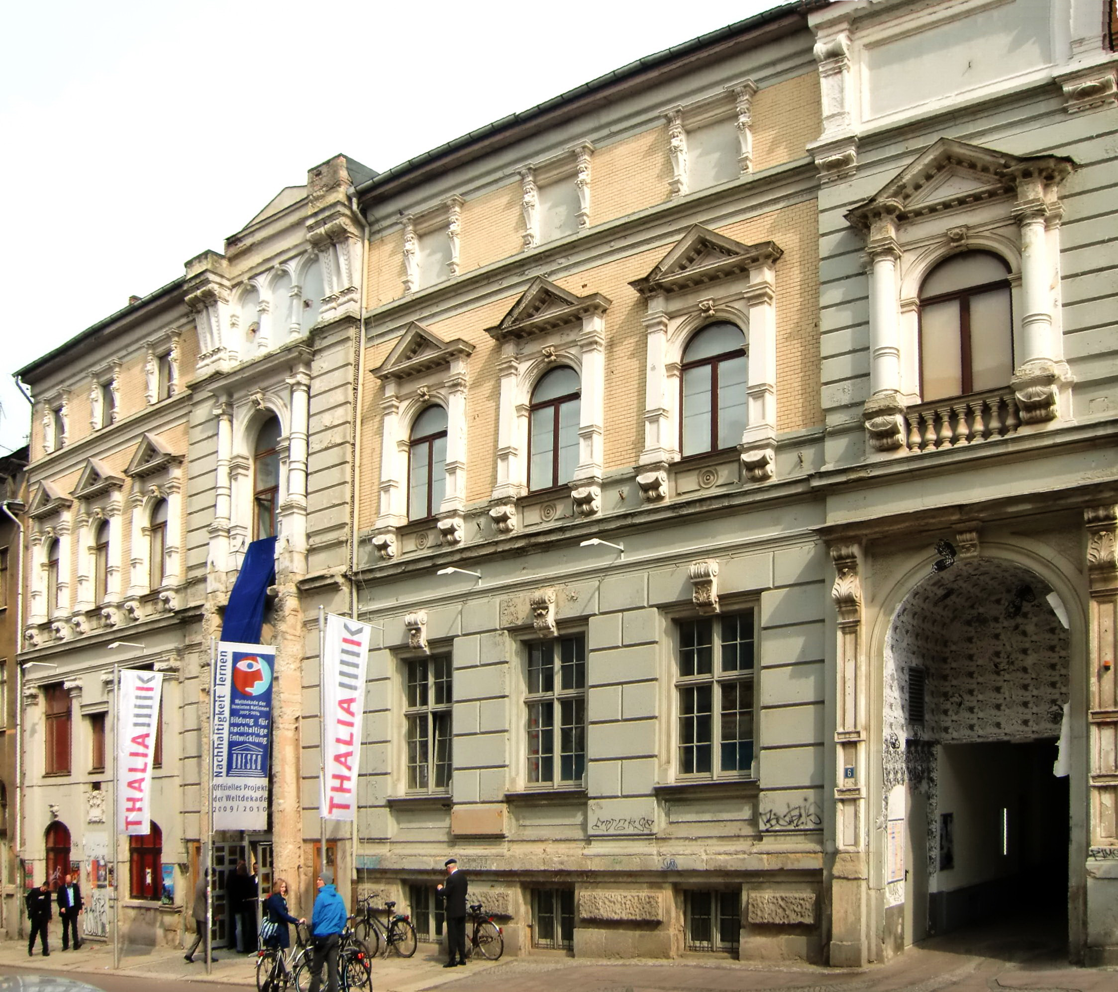 Heutige Ansicht des Logenhauses „Zu den fünf Türmen am Salzquell“, ehem. Spielstätte des Thalia Theaters, Sitz des Programmkinos Puschkino